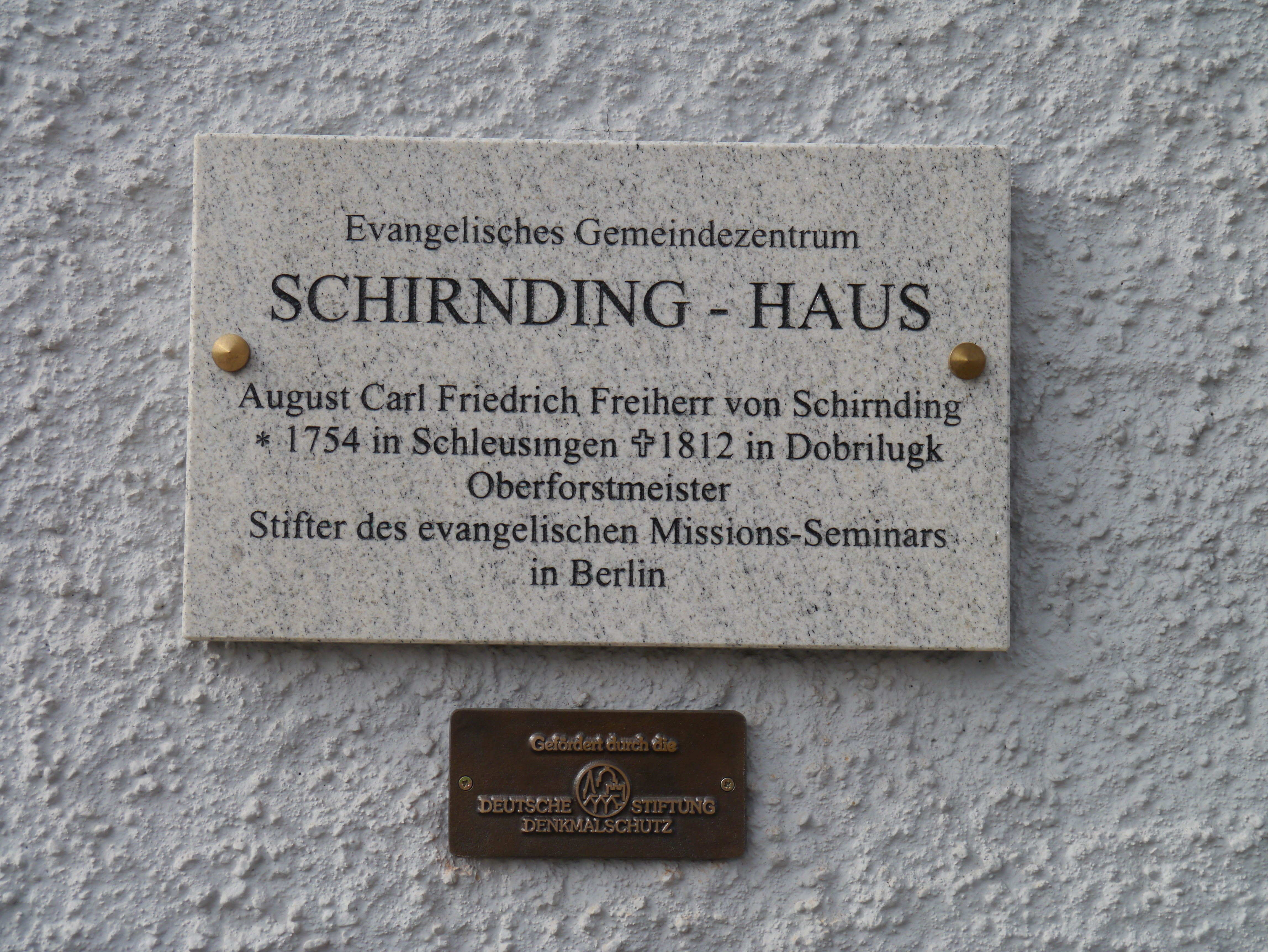 Altes Pfarrhaus Doberlug - Schirnding Haus 2014.